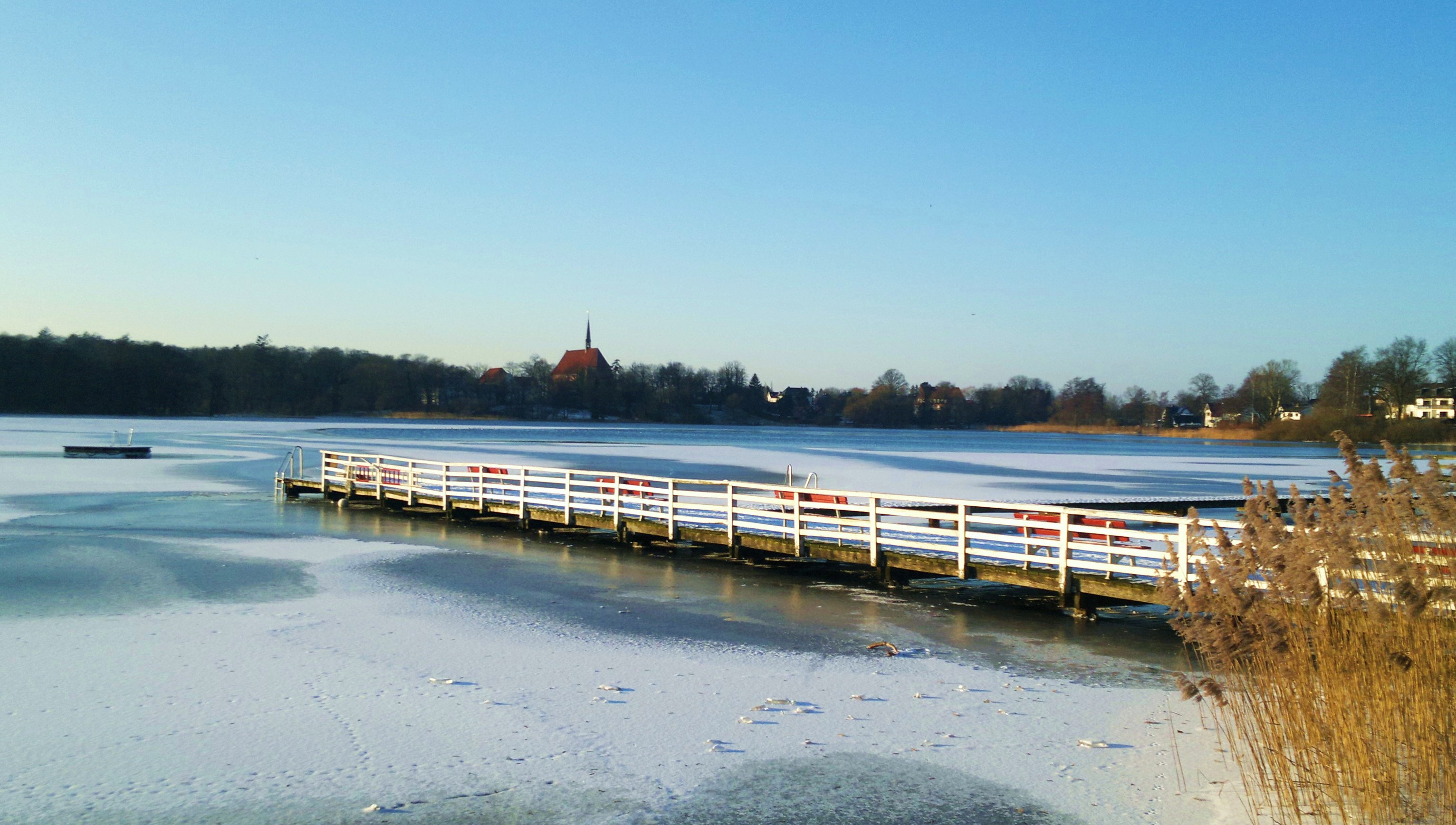 Aufgenommen am Bordesholmer See